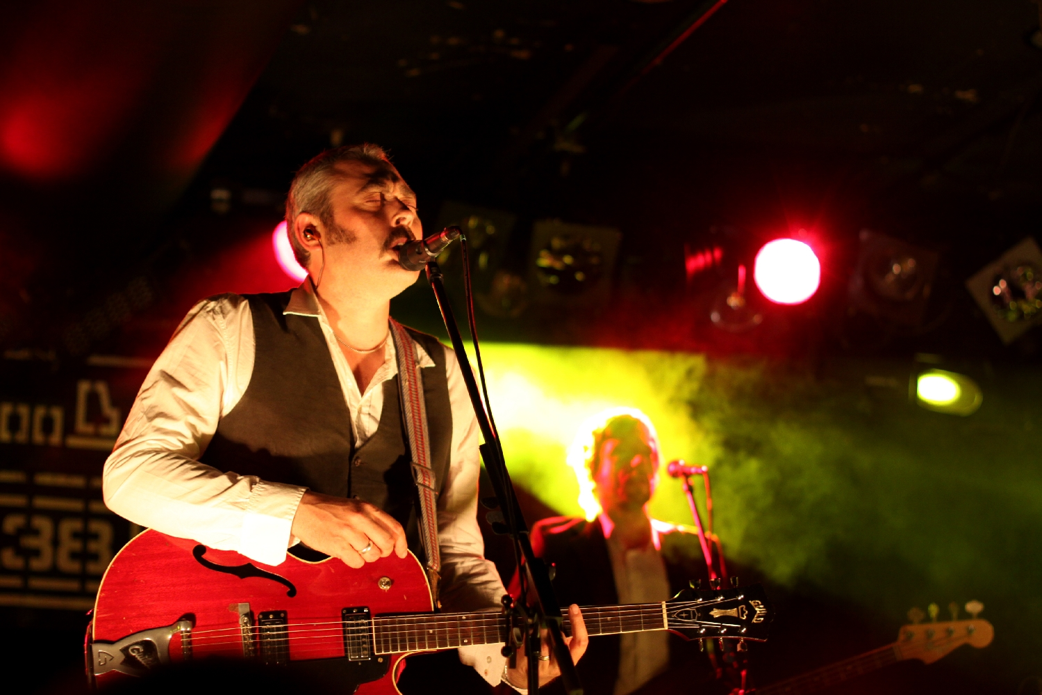 Le 12 mai 2012 à Budapest